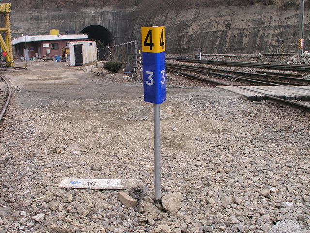 Le poteau de kilomètre de 3.4km(de Uiwang) à la gare d'Obong.